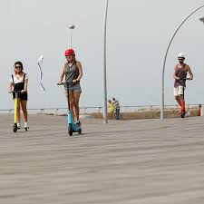 קורקינטים חשמליים בתל אביב